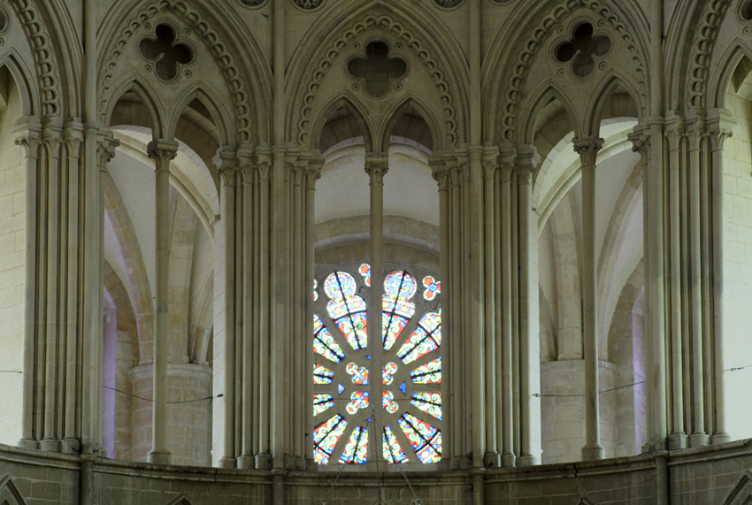 This building is en partie classé, en partie inscrit au titre des Monuments Historiques. .